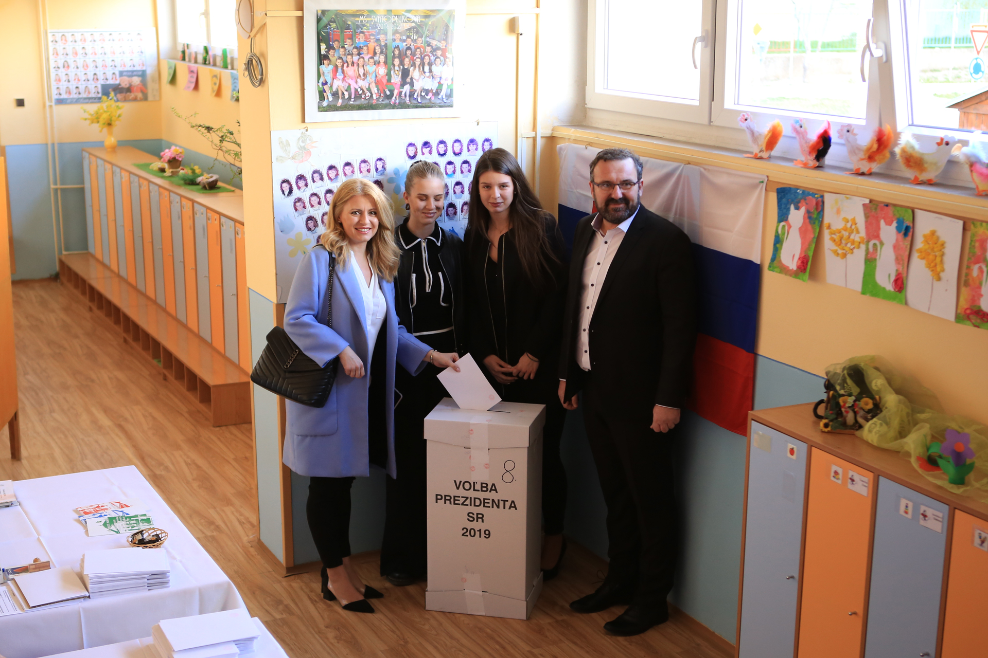 Prezidentská kandidátka Zuzana Čaputová s rodinou a partnerom vhadzuje obálku so svojou voľbou pri prezidentských voľbách 2019 v priestoroch Materskej školy na Svätoplukovej 51 v Pezinku.